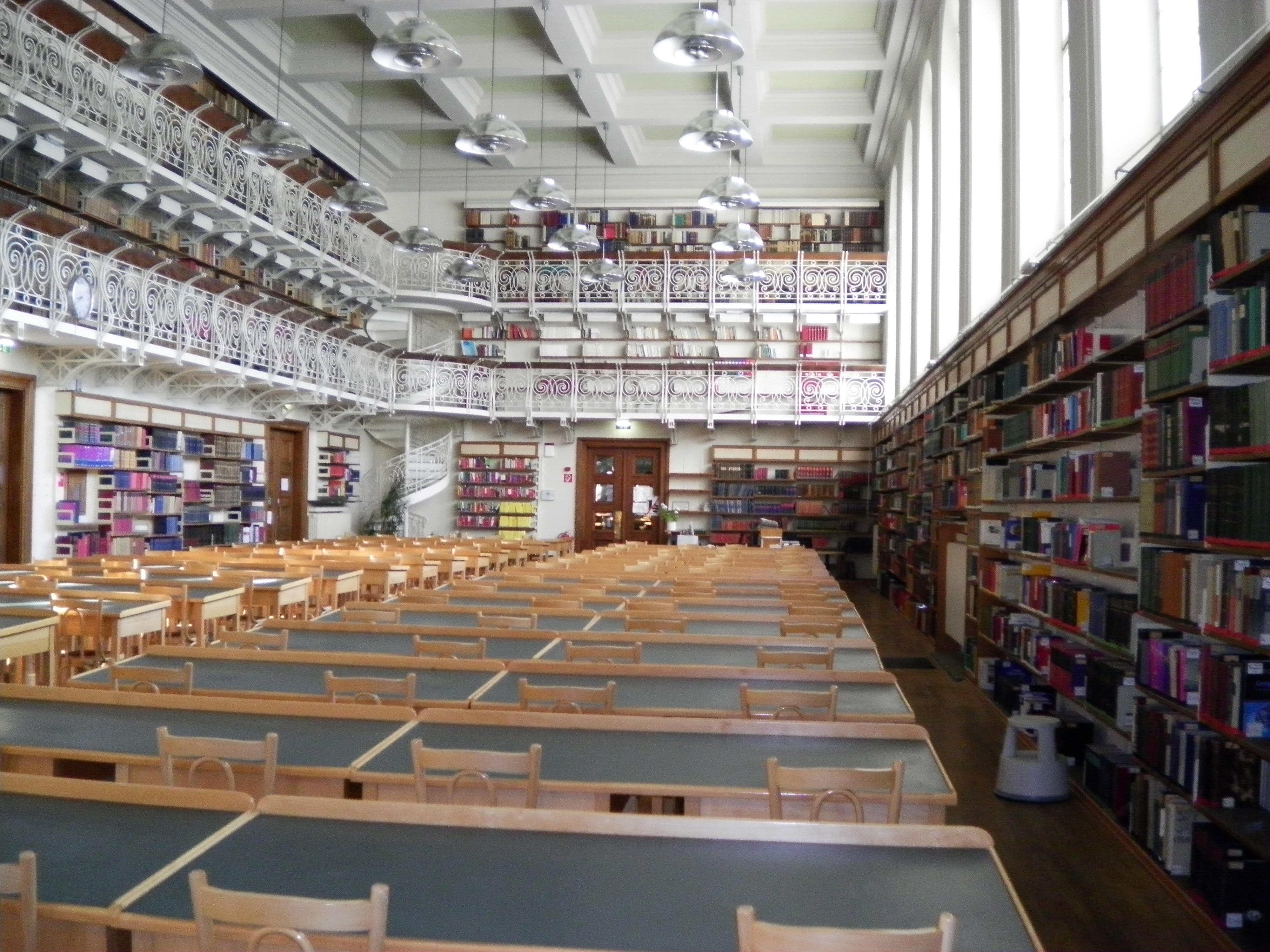 Historischer Lesesaal; ULB-Tirol; Innrain 50; Innsbruck